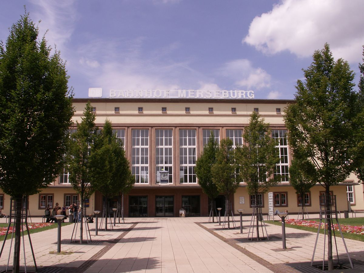 Bahnstrecken um Merseburg, Bahnhofsgebäude Merseburg